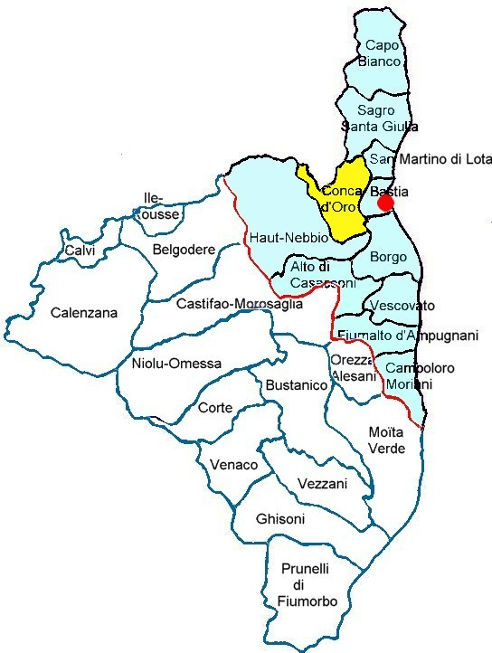 Localisation du canton de Conca-d’Oro, Nebbiu, Haute-Corse